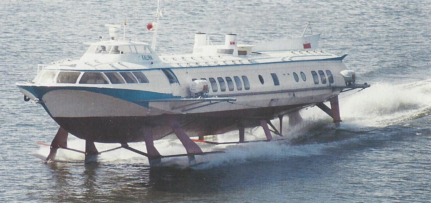 Polnisches Tragflügelboot Kalina vom russischen Typ „Kometa“.